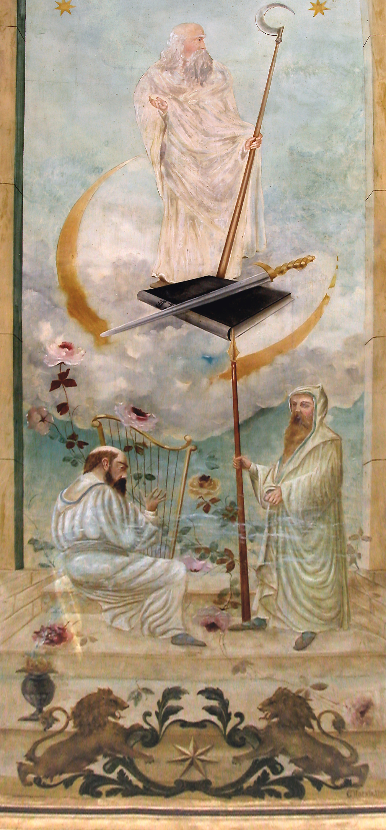 14.06.2004 01099 Dresden-Neustadt, Martin-Luther-Str. 17 (GMP: 51.064217,13.755556): Mietshaus, 1896 erbaut für Friedrich Reinhold Schulze. Der Hausbesitzer, von Beruf Fleischermeister, bewohnte das zweite Obergeschoß. Schulze war Mitglied des Druidenordens, einer den Freimaurern ähnlichen Gemeinschaft. Der Blickfang im Entree ist das Deckengemälde, das sich mit der Mythologie der Druiden befaßt. Die weiß gekleideten bärtigen Männer stehen für die drei Grade der Ordensgemeinschaft. Über den beiden unteren Graden erblickt man einen Druiden, der sich im Himmel über einer Mondsichel erhebt. Sein Stab ist mit der Druidensichel gekennzeichnet. Das Gemälde ist von Carl Harstall signiert, einem Dresdner Dekorationsmaler. [DSCN3832.TIF]20040614150DR.JPG(c)Blobelt